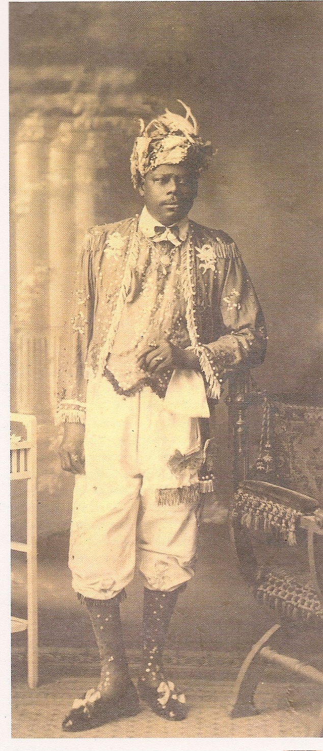 Osuanlele Okizi Erupê, Príncipe do Benin, conhecido no Brasil como Príncipe Custódio, radicado em Porto Alegre em 1901